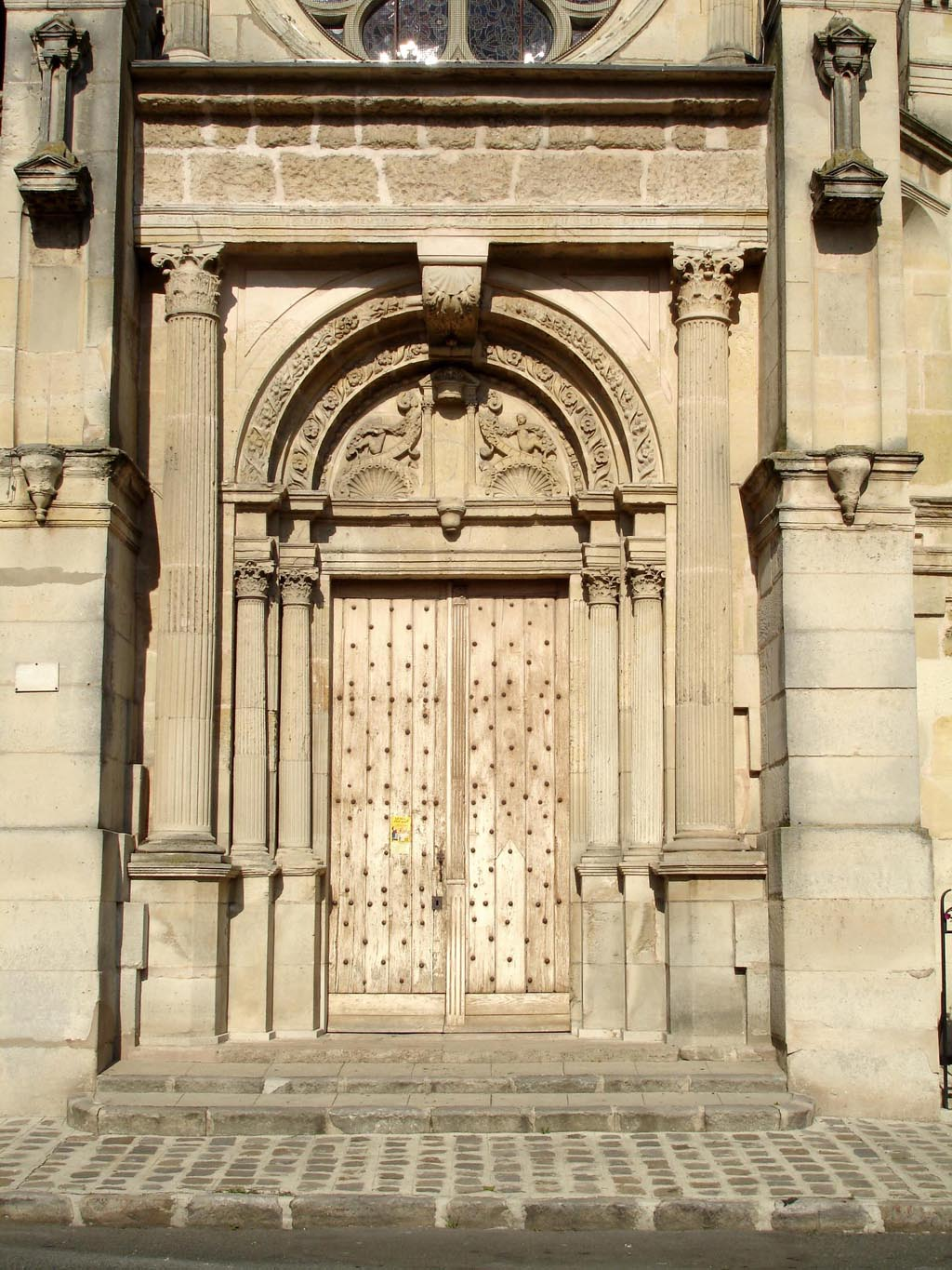 Portail occidental de l'église Saint-Pierre-Saint-Paul à Sarcelles (Val-d'Oise), France